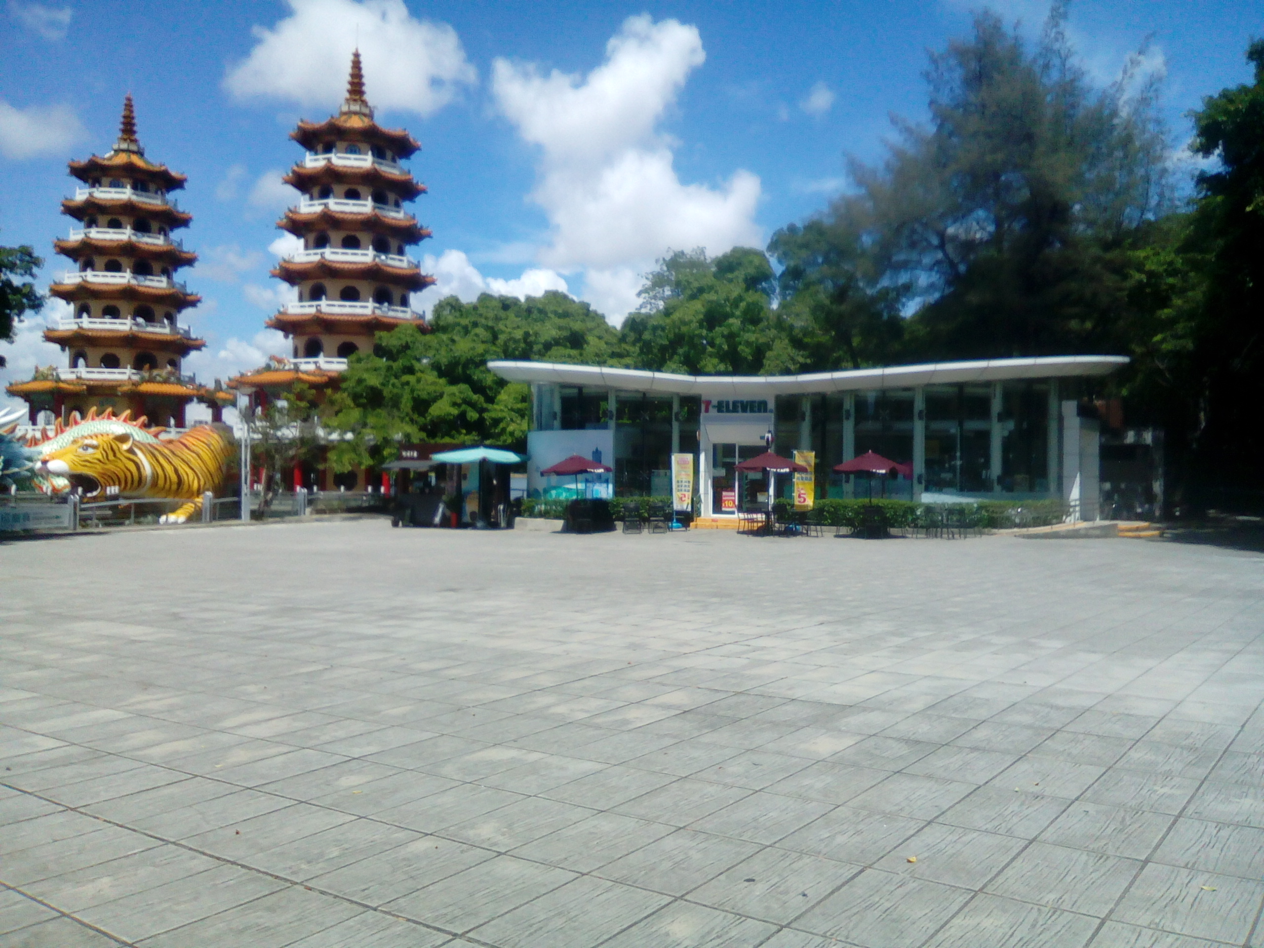 近勝利路的入口處